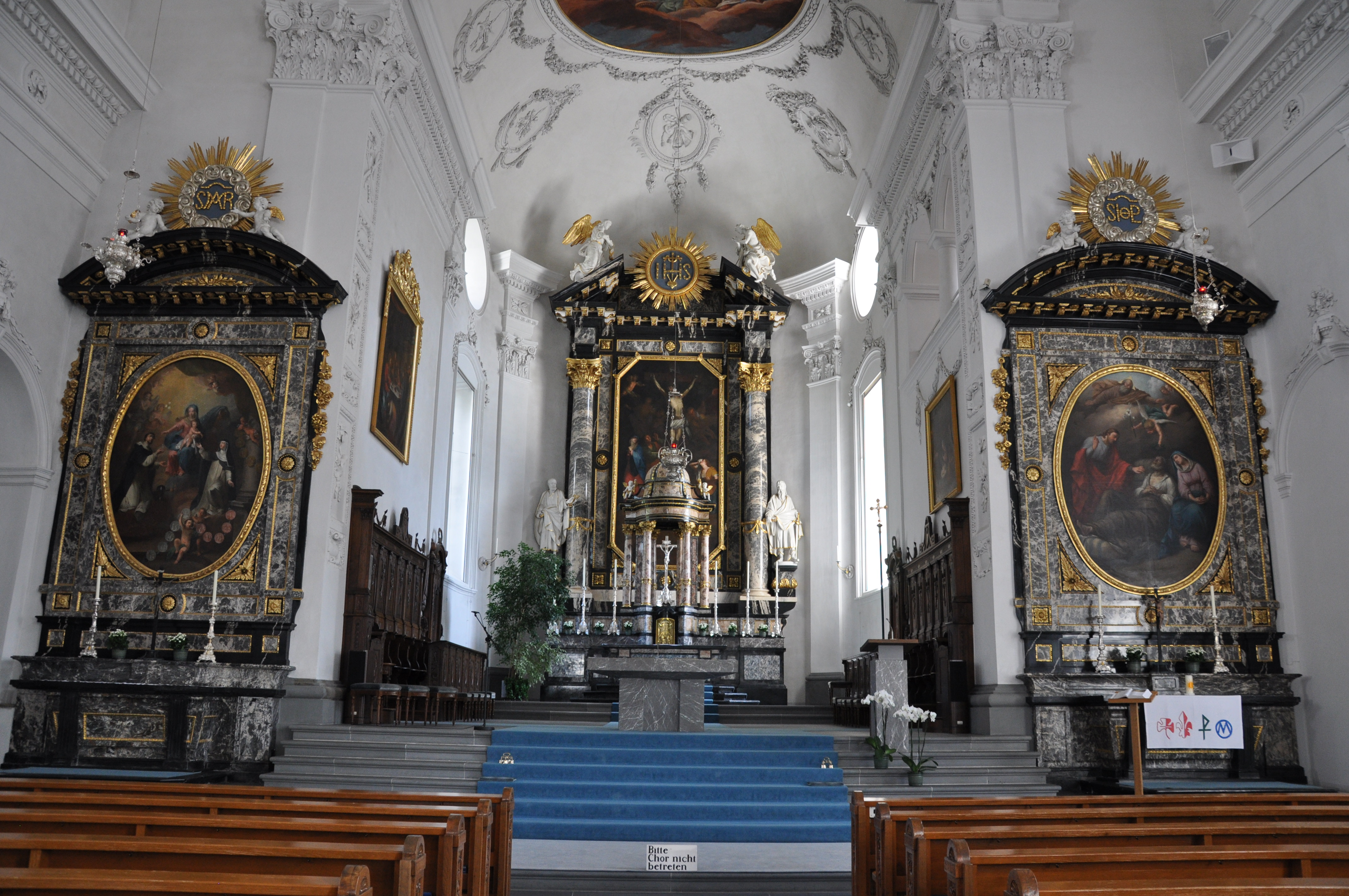 Eglise vue intérieure